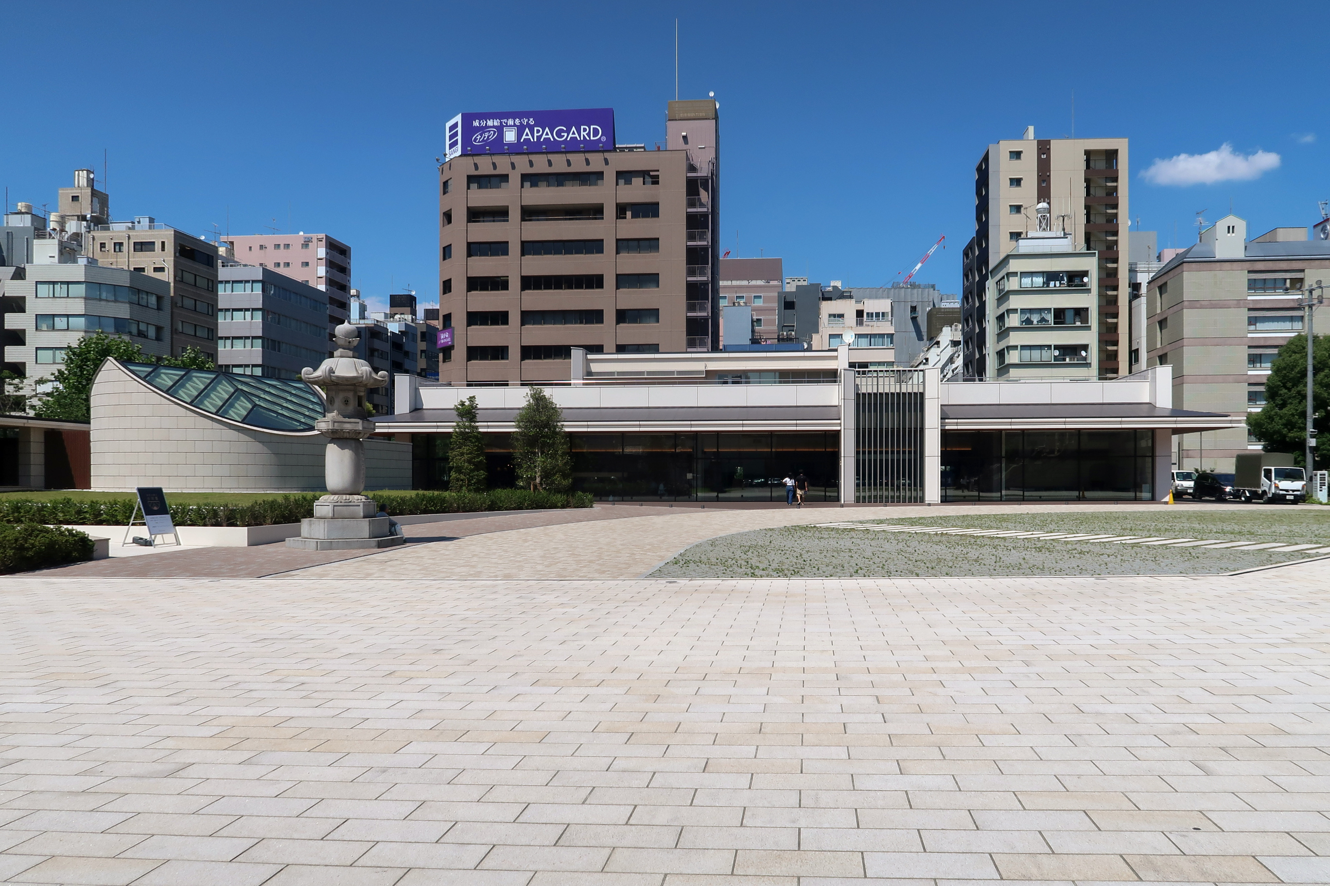 Tsukiji Hongan-ji Information Centre